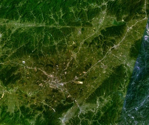 永康市卫星地形地图